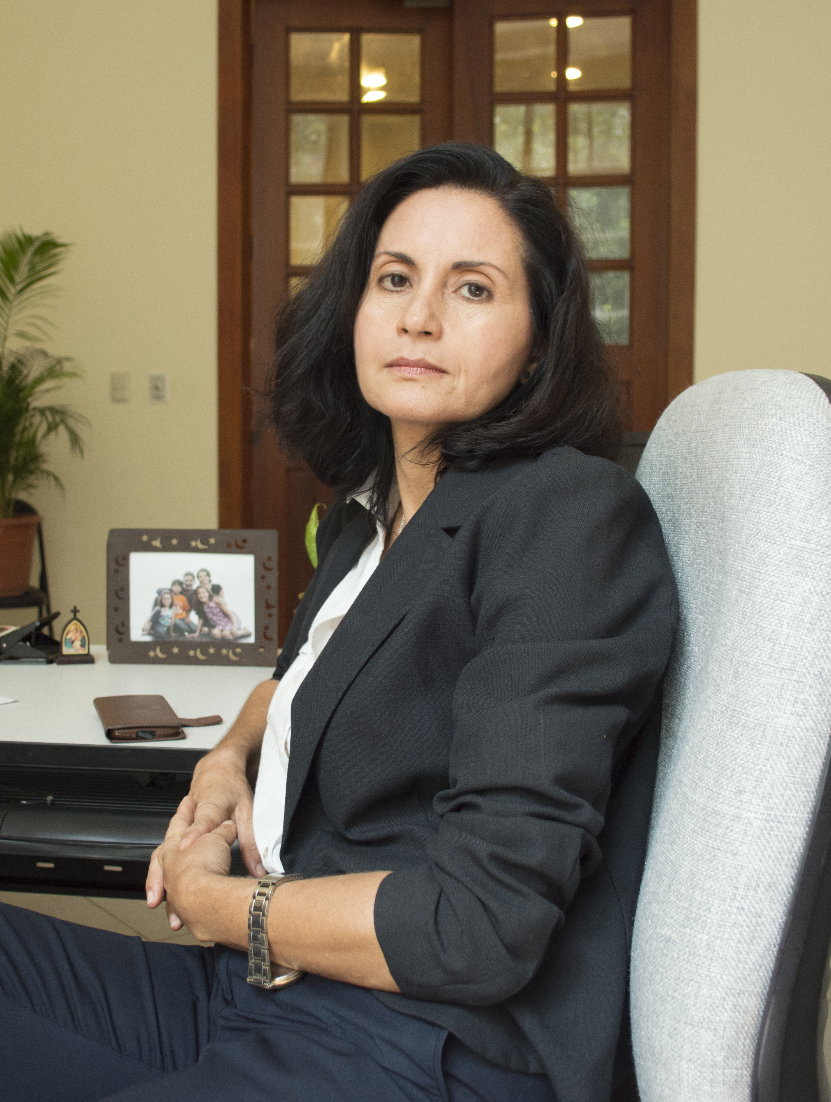 Montse Serra interpretando el papel de Jaramillo durante el rodaje de la película Entre Sombras: Averno